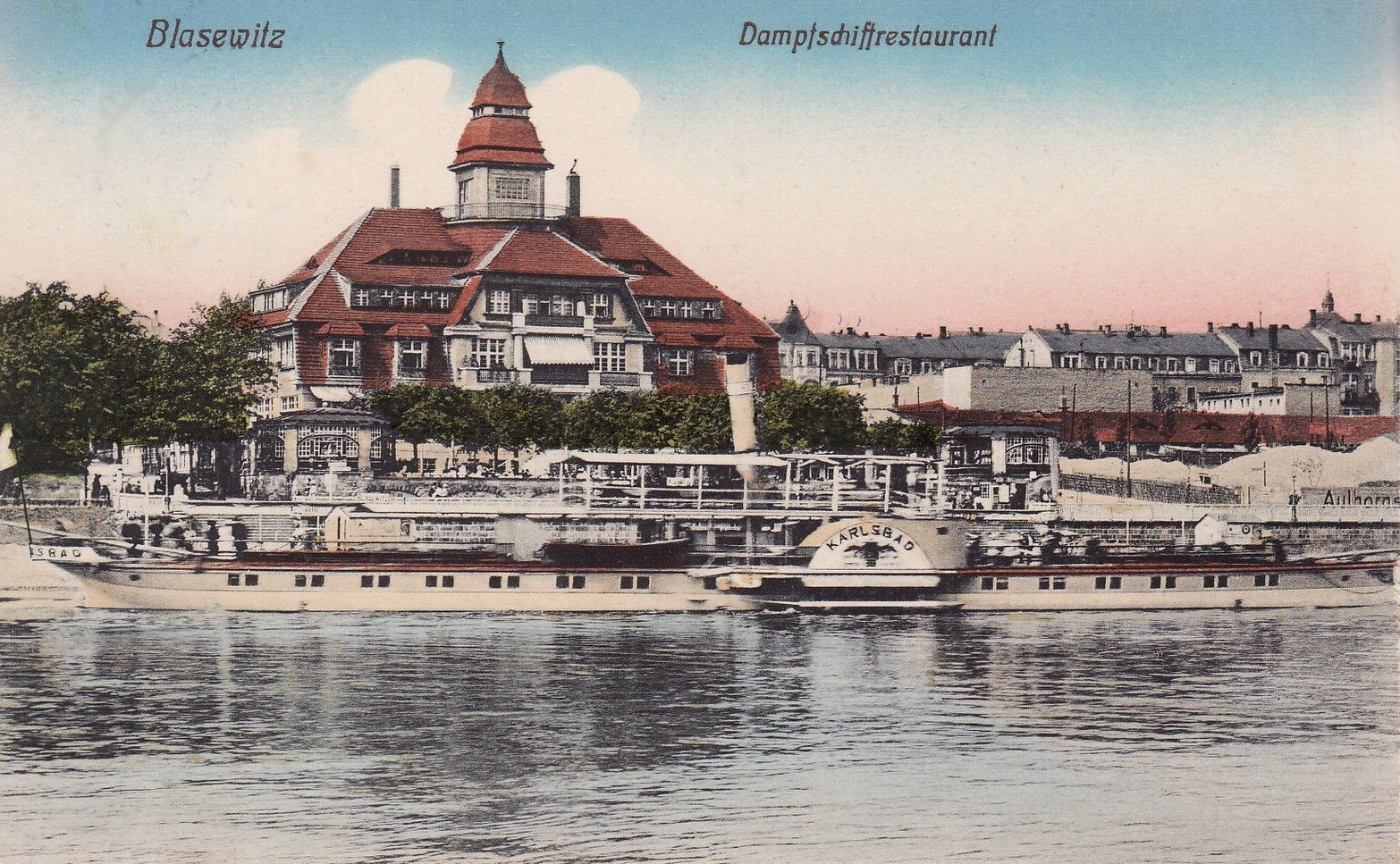 Dampfschiff Karlsbad